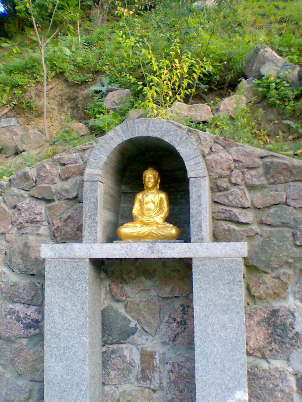 "Білий лотос". Буддистський храм в Черкасах